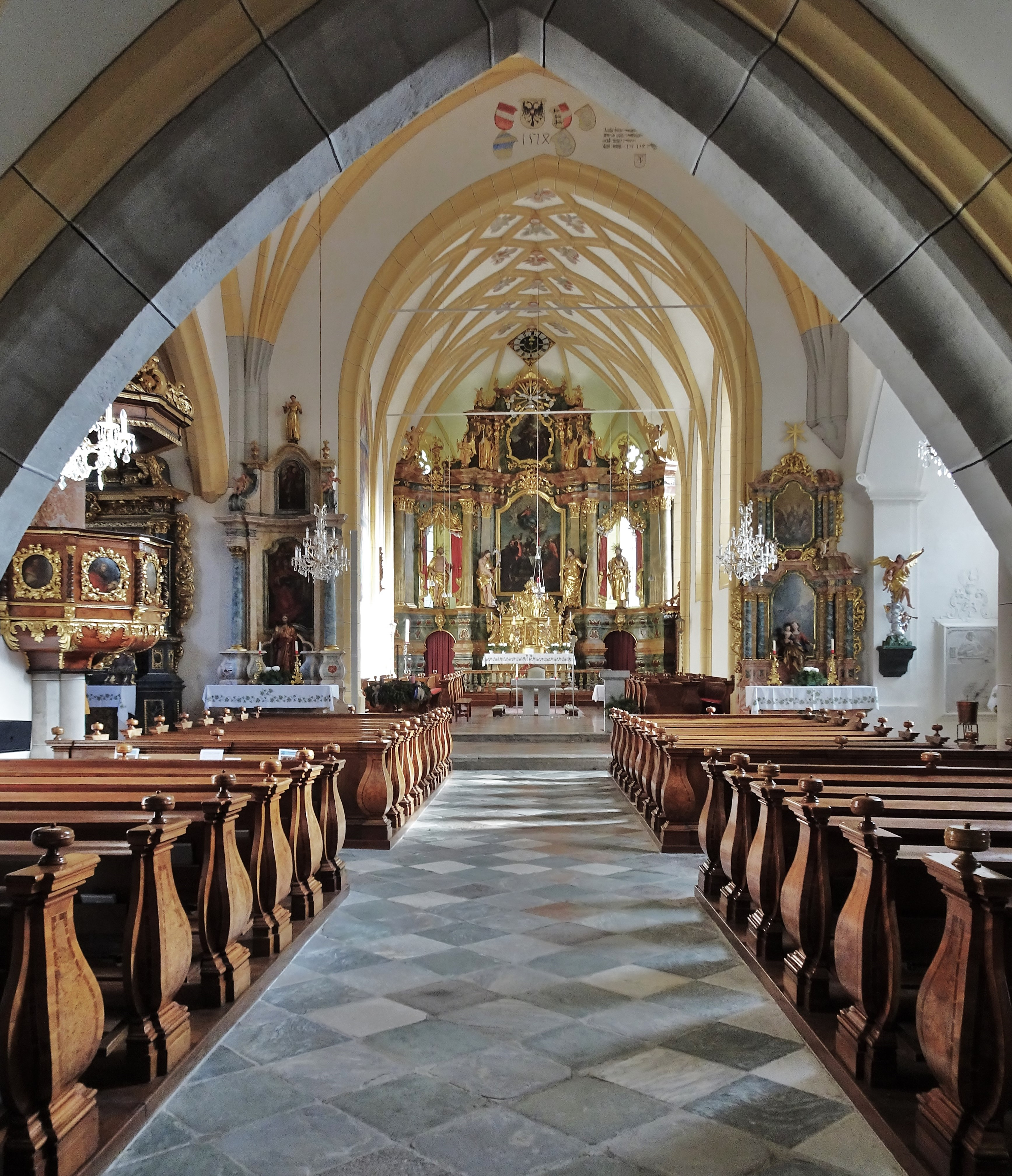 Kath. Pfarrkirche Hl. Martin (Obervellach), Innenansicht